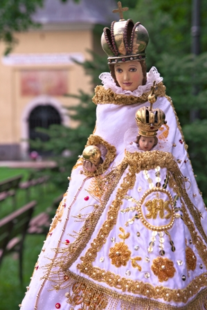 Milostivá soška Panny Márie v Marianke